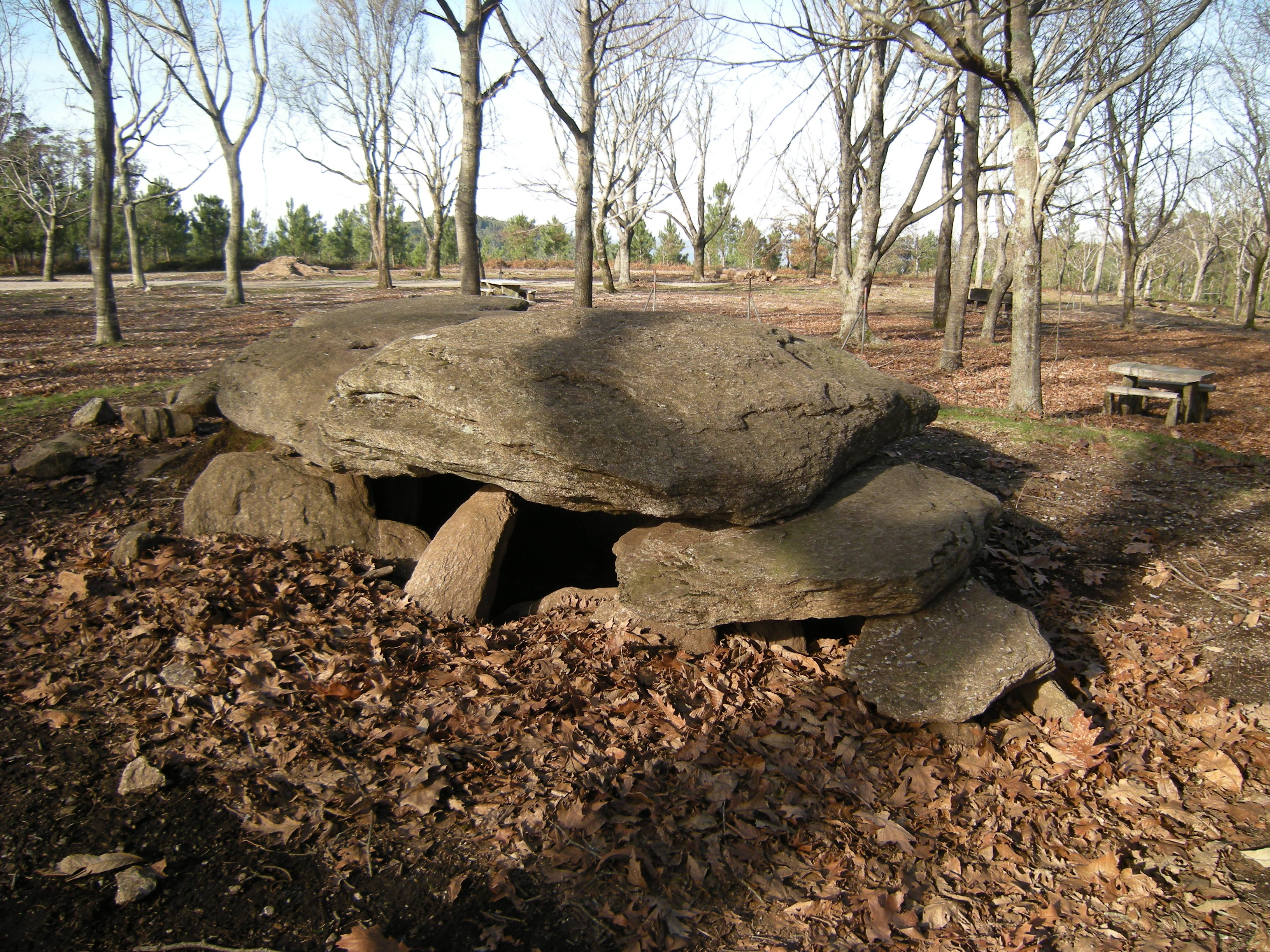 Esta foto participó en el juego En otro lugar de Flickr.